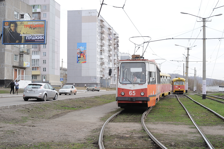 LM-93 65 in Ossinniki